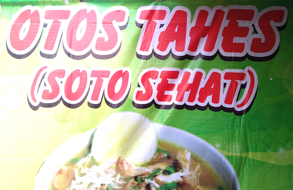 Spanduk dengan bahasa walikan Malang